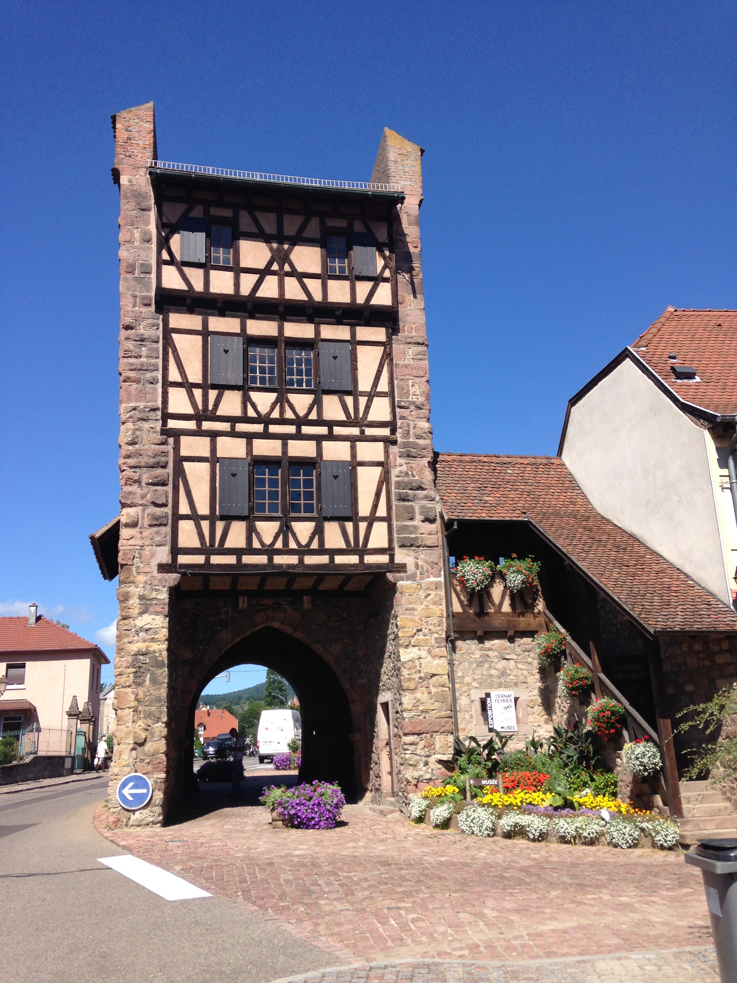 Porte de Thann inCernay